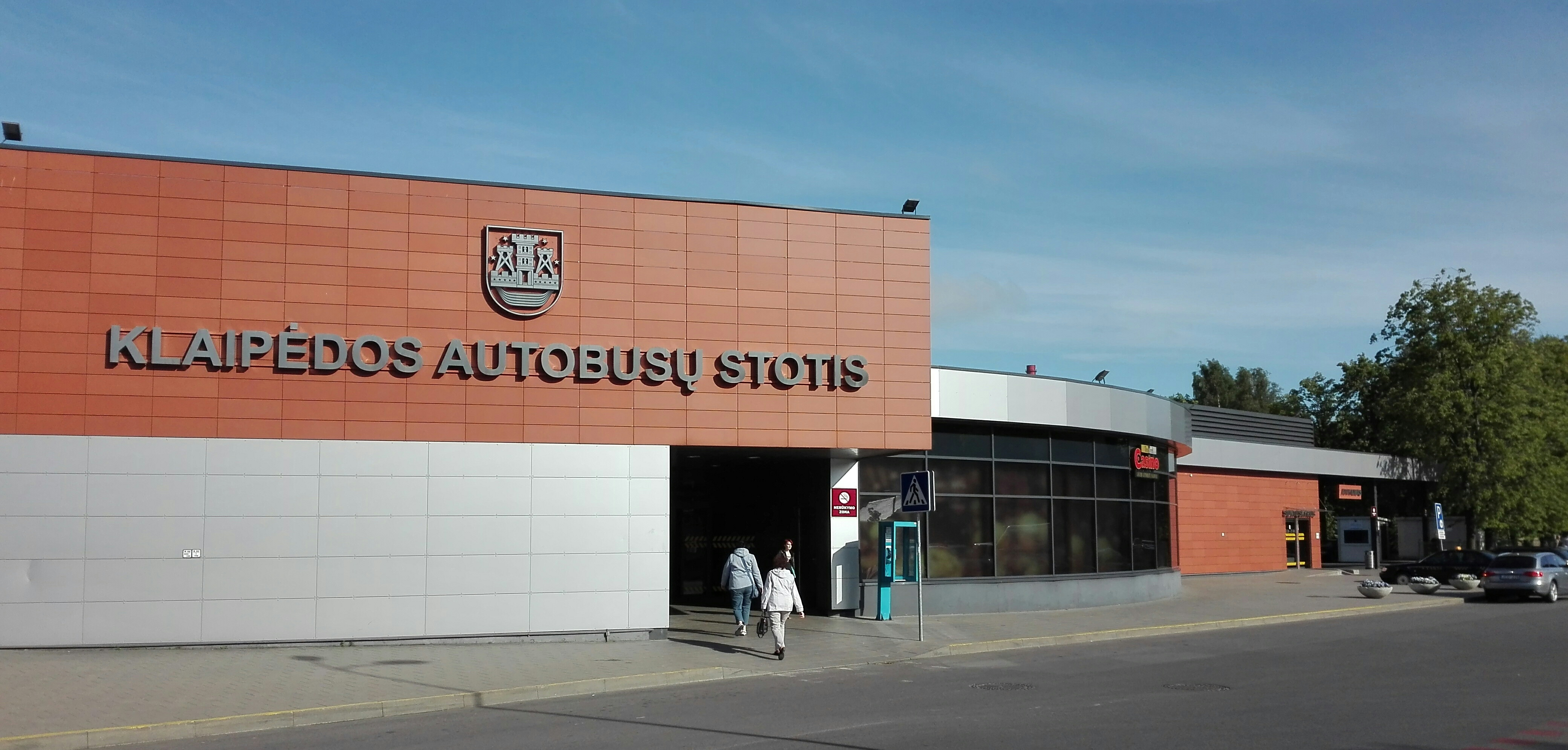 Klaipėdos autobusų stotis